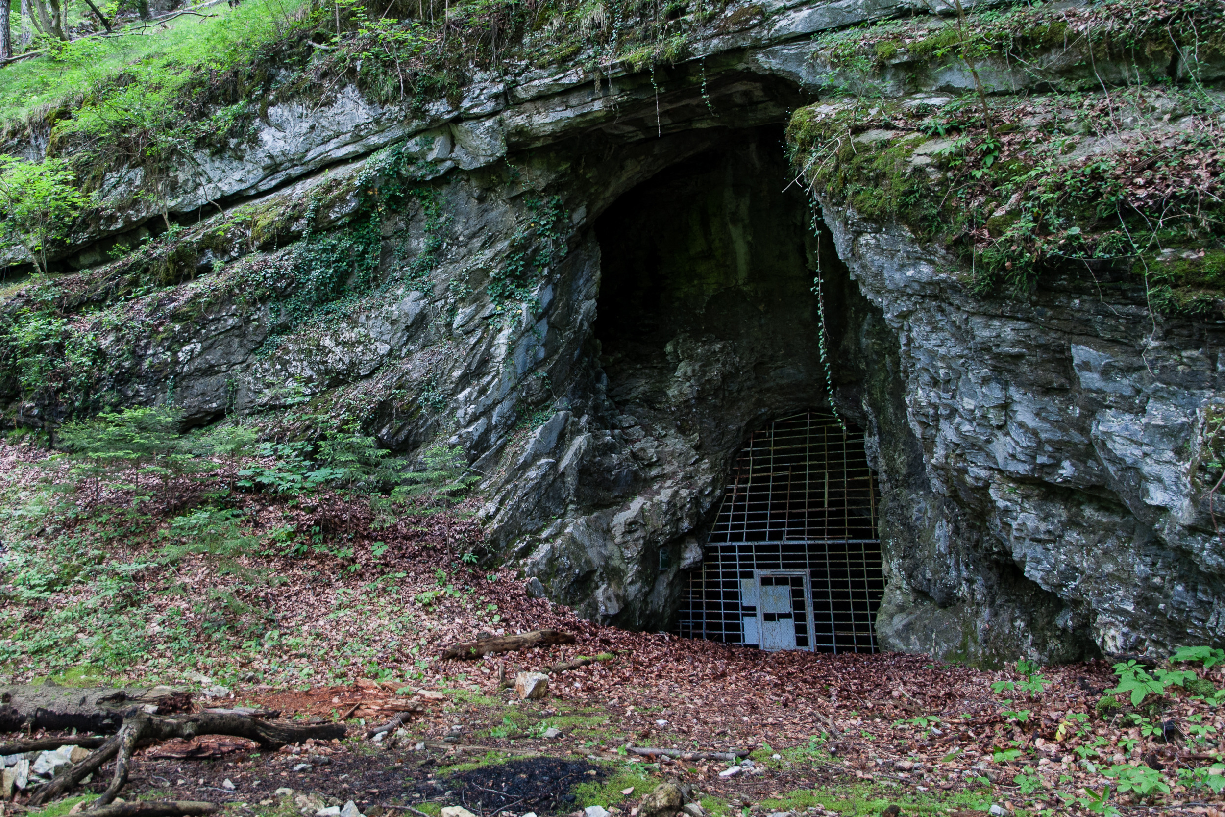 Eingang zur großen Badlhöhle bei Peggau, Österreich.